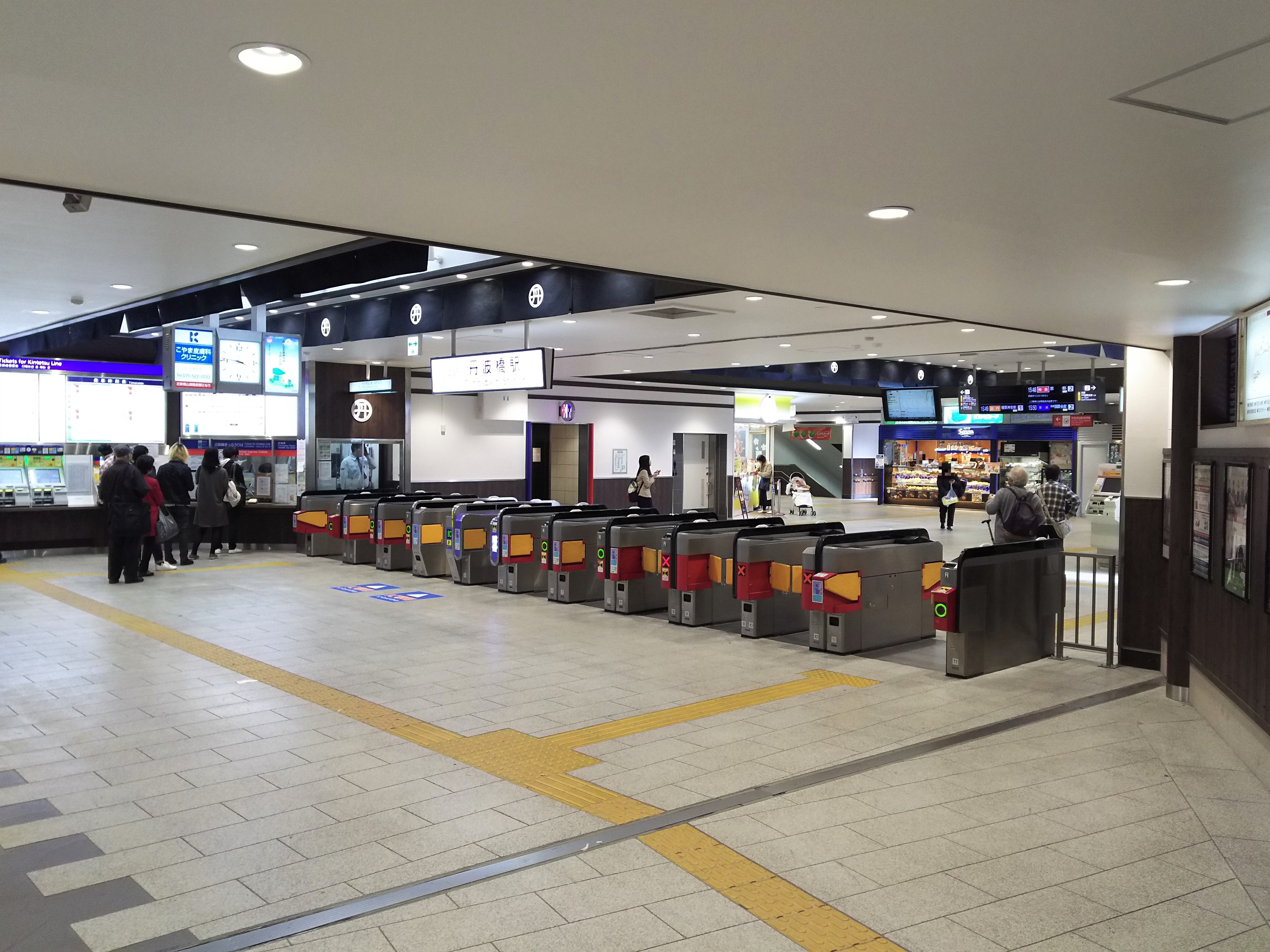 近鉄京都線近鉄丹波橋駅改札口（京都市伏見区）